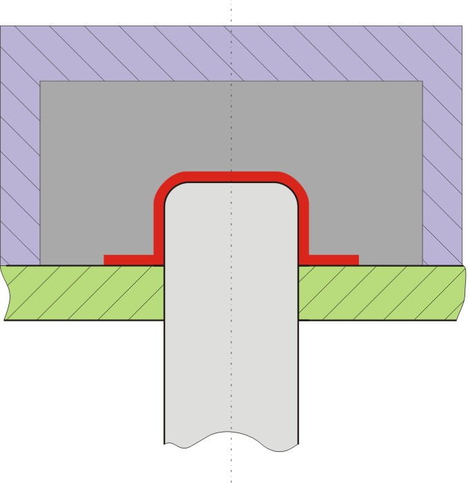 tahanie hlboke